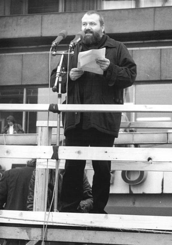 ADN-ZB Link 4.11.89 Berlin: Demonstration 500.000 Bürger beteiligten sich an einer Demonstration für den Inhalt der Artikel 27 und 28 der Verfassung der DDR. Auf dem anschließenden Meeting auf dem Alexanderplatz ergriff auch der Journalist Klaus Baschleben von der "National-Zeitung" das Wort.